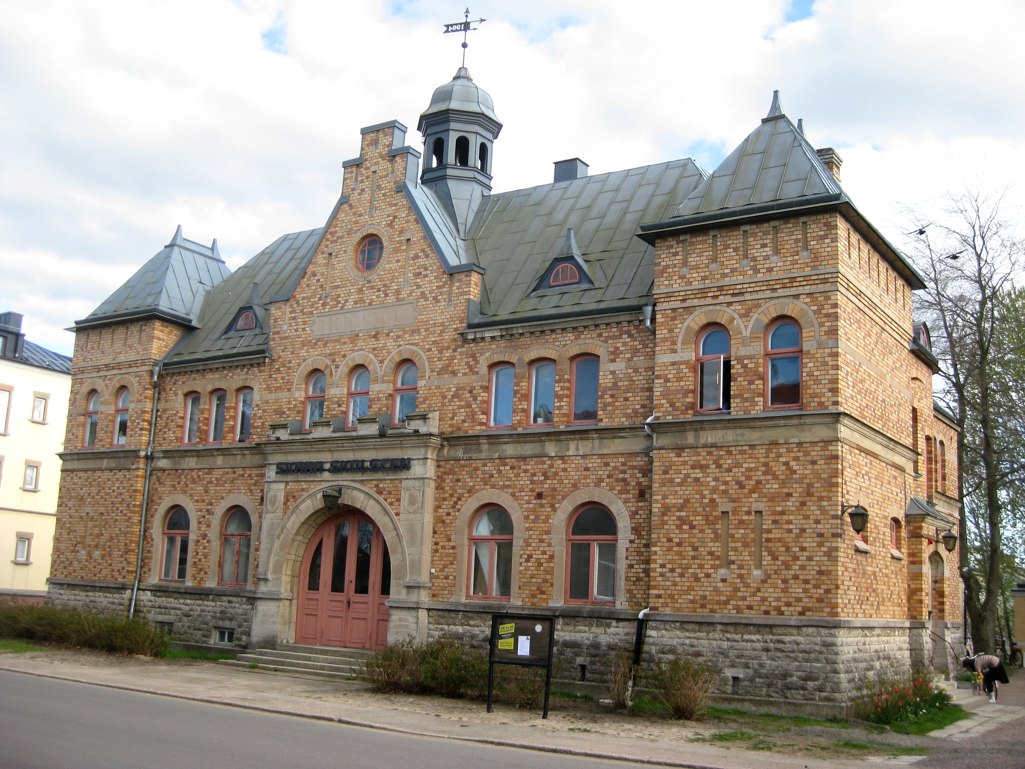 Skara Skolscen